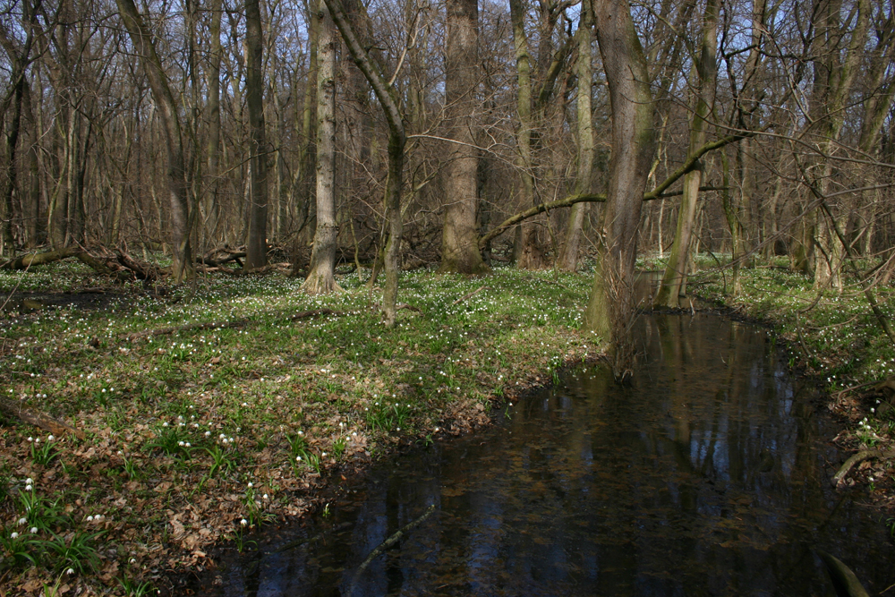 A csáfordjánosfai tőzikés erdő, Győr-Moson-Sopron megye